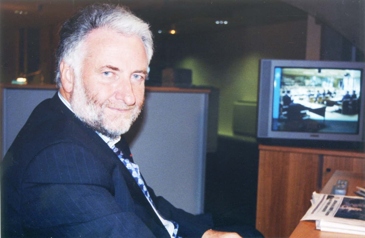 Le dirigeant d'entreprises Loïk Le Floch-Prigent, le 29 novembre 1999.